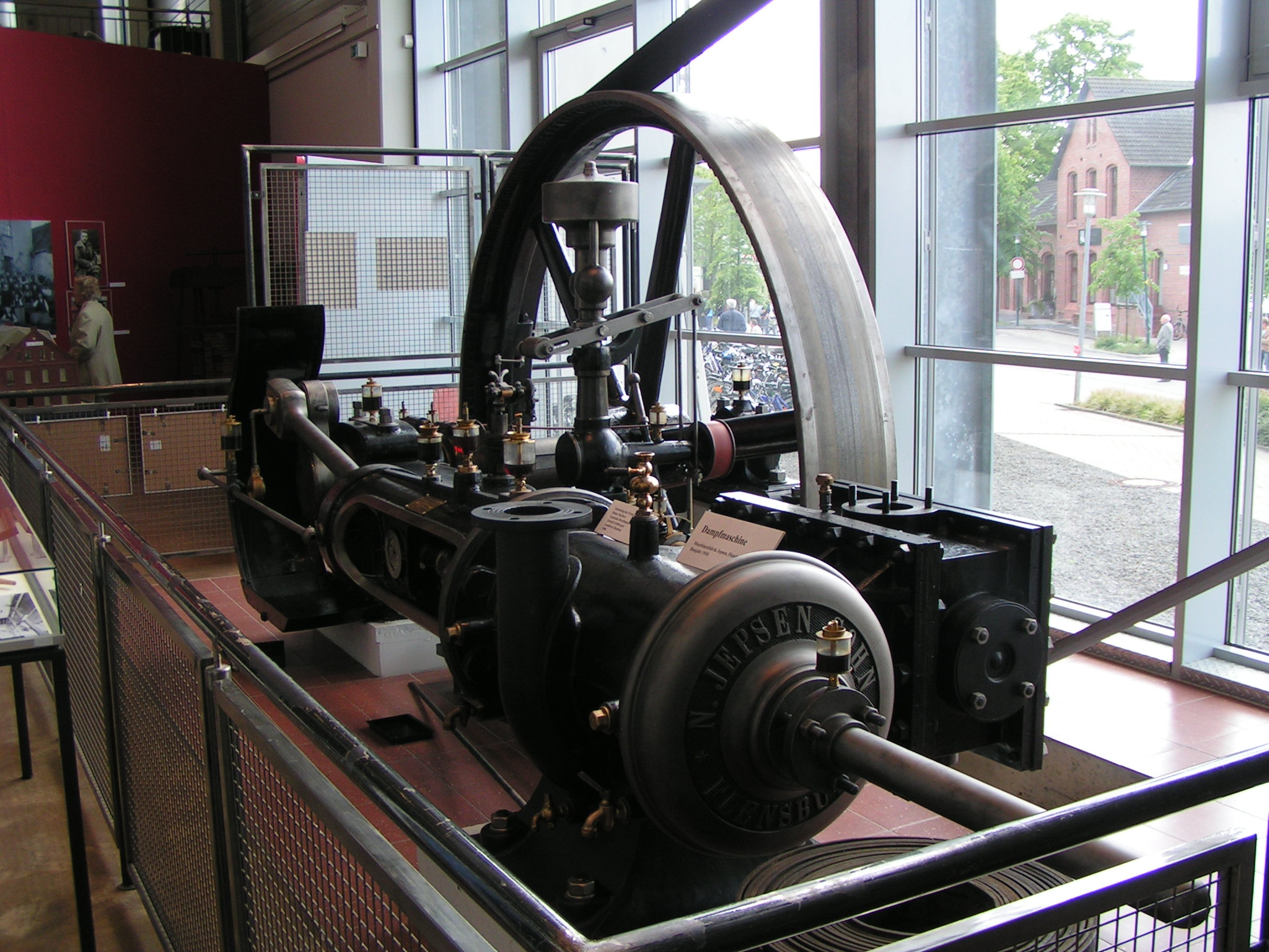 Dampfmaschine im Industrie Museum Lohne. Im Hintergrund der Lohner Bahnhof